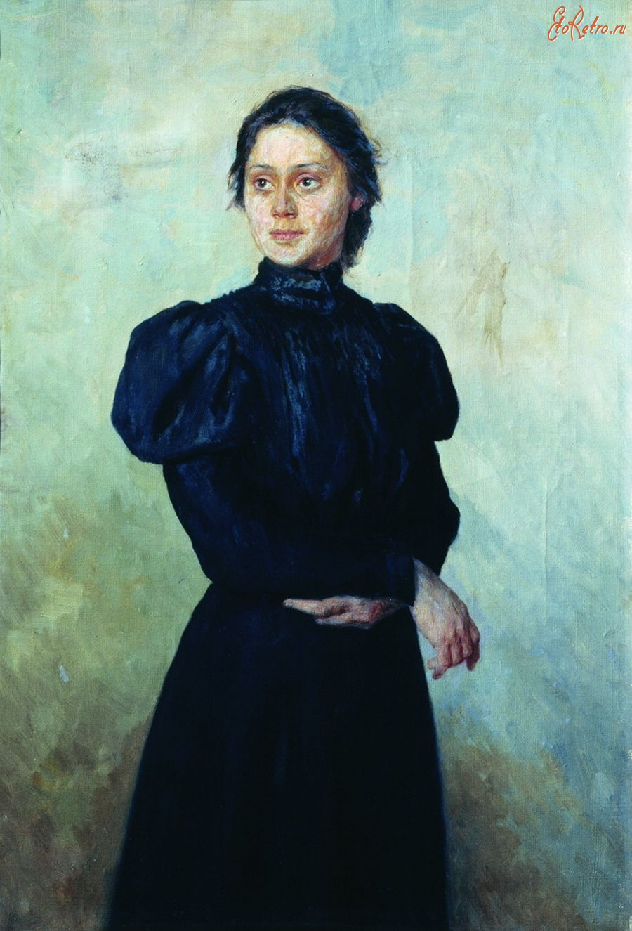 Портрет Веры Глебовны Успенской. Полтавский областной художественный музей им. Николая Ярошенко, Украина